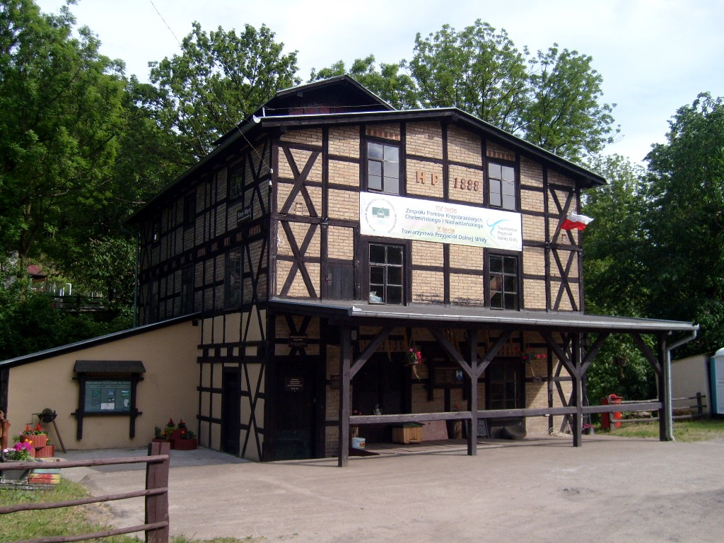 Młyn we wsi Gruczno, woj. kujawsko-pomorskie, pow. świecki.